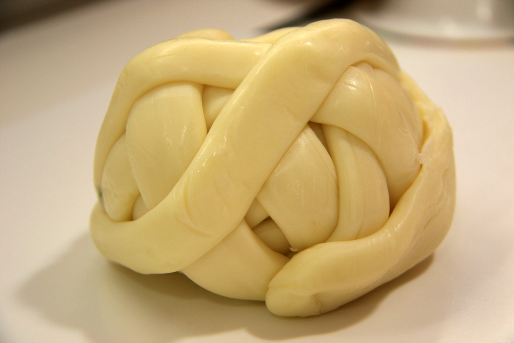 Ver artículo en mi Blog en Enlace See post in My blog at Link